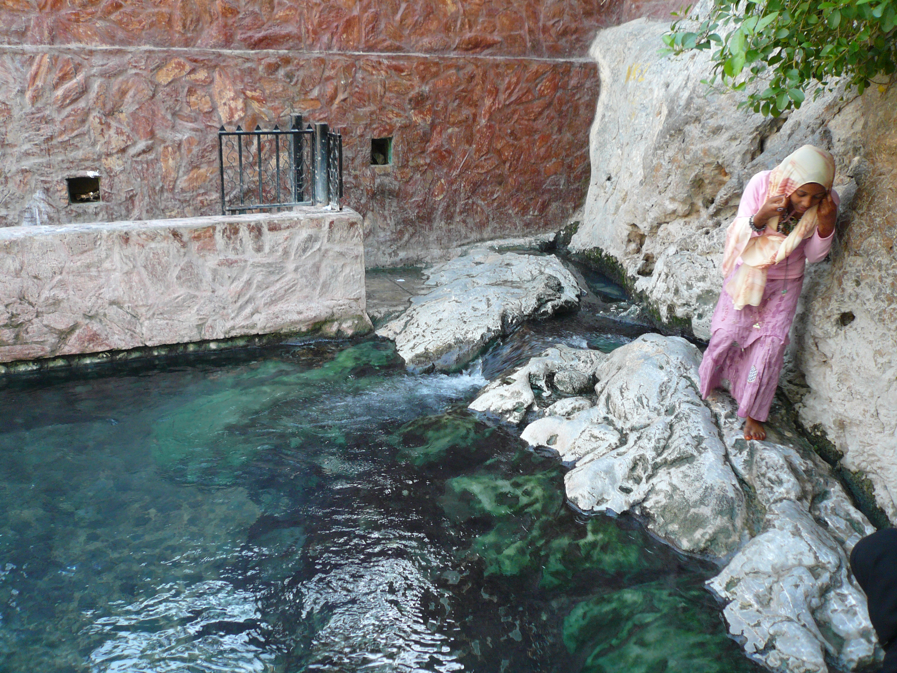 Thowarah hot spring (Al Batinah, Oman) - P1030332.JPG